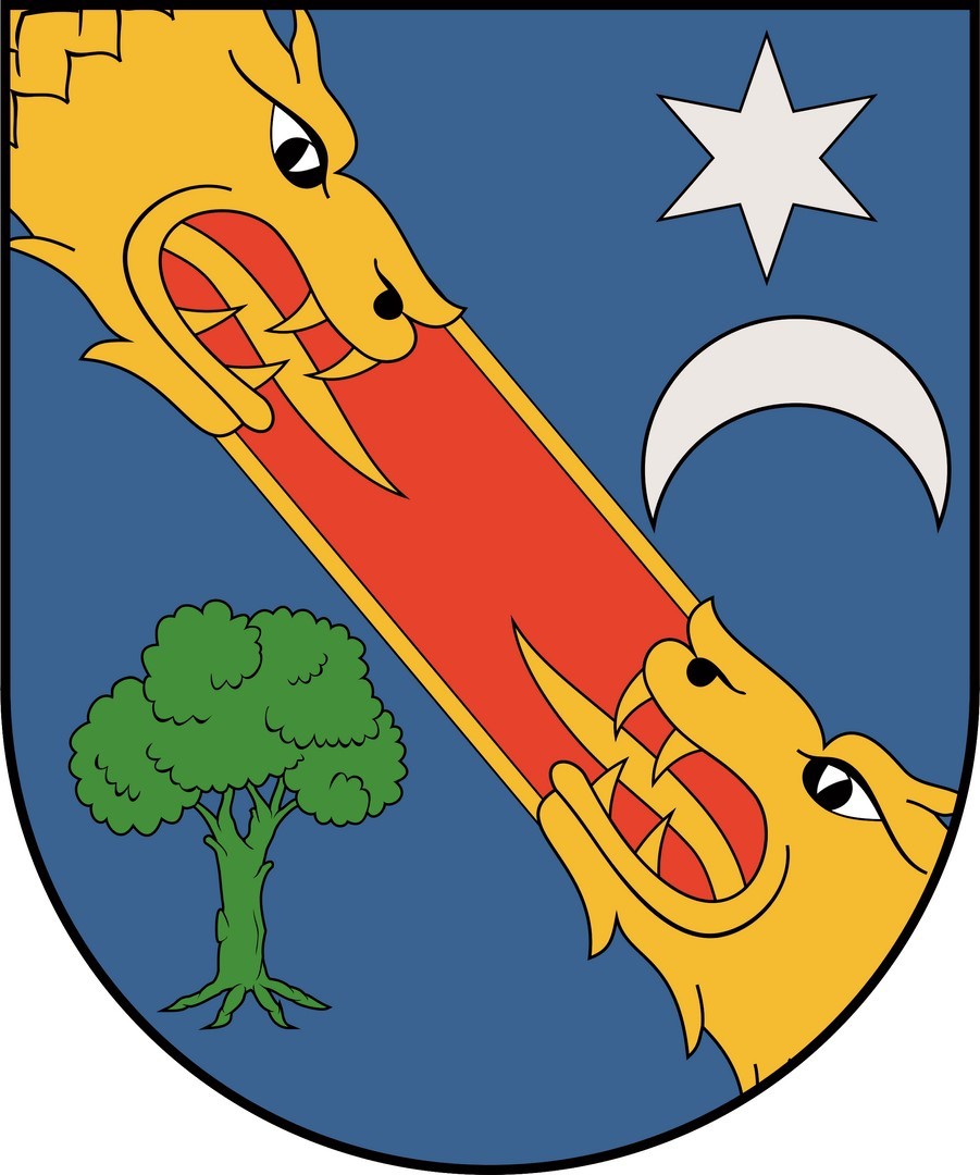 Escudo del linaje español de los Montúfar originarios de Tamajón